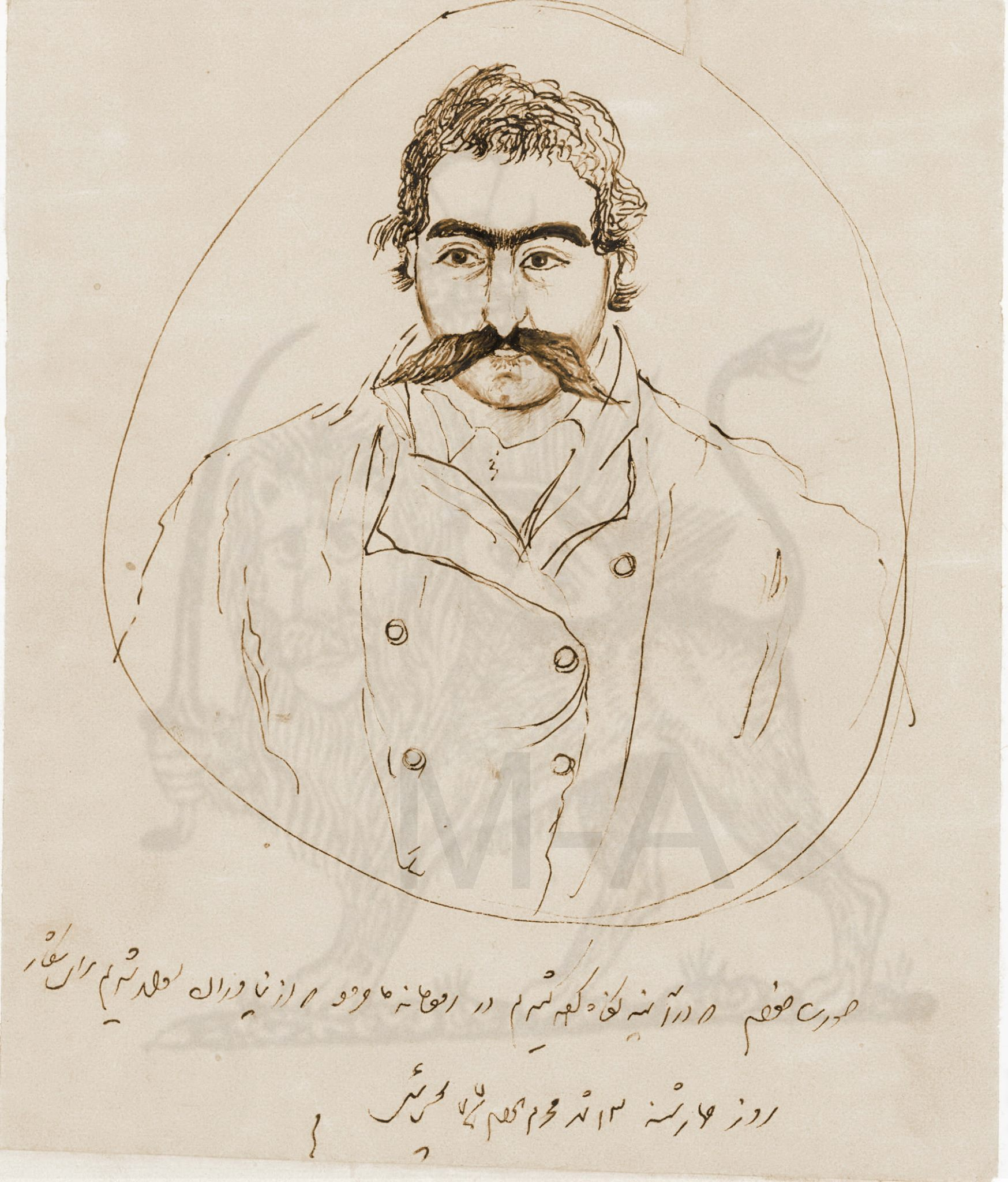 نقاشی ناصرالدین شاه که از خود کشیده متن دستخط ناصرالدین شاه ذیل تصویر: «صورت خودم که در آینه نگاه کردم کشیدم. در رودخانه جاجرود که از نیاوران سوار شدیم برای شکار، روز چهار شنبه ۱۳ شهر محرم الحرام سنۀ۷۷ [۱۲] بیچی ئیل»